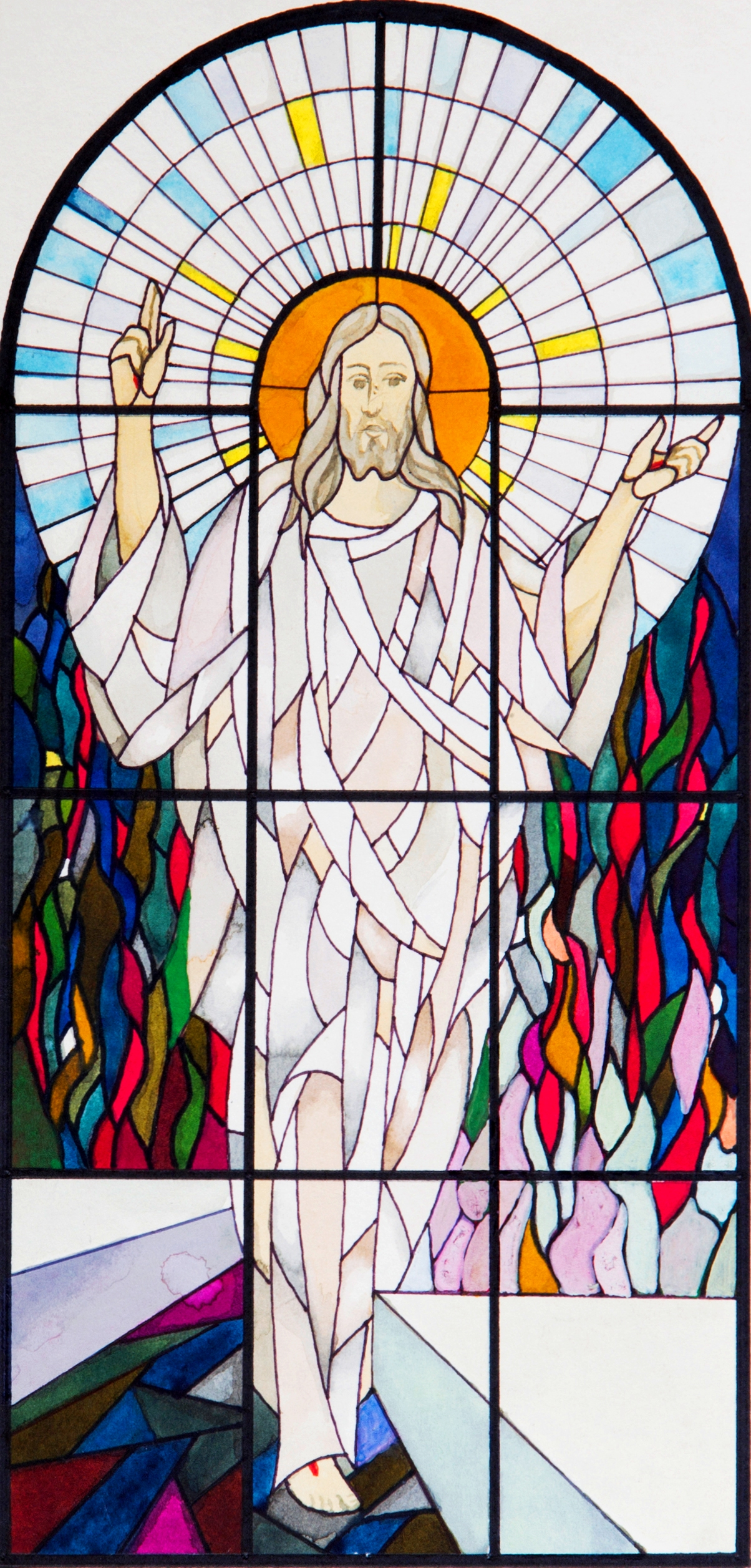 Witraż "Zmartwychwstanie" znajdujący się w kościele Imienia Maryi w Bączalu Dolnym. Zaprojektowany przez art. plast. Zygmunta Czyża